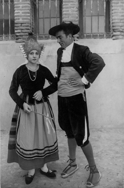 Tipos segovianos - Segovia - 115 x 175 Fotografía B/N